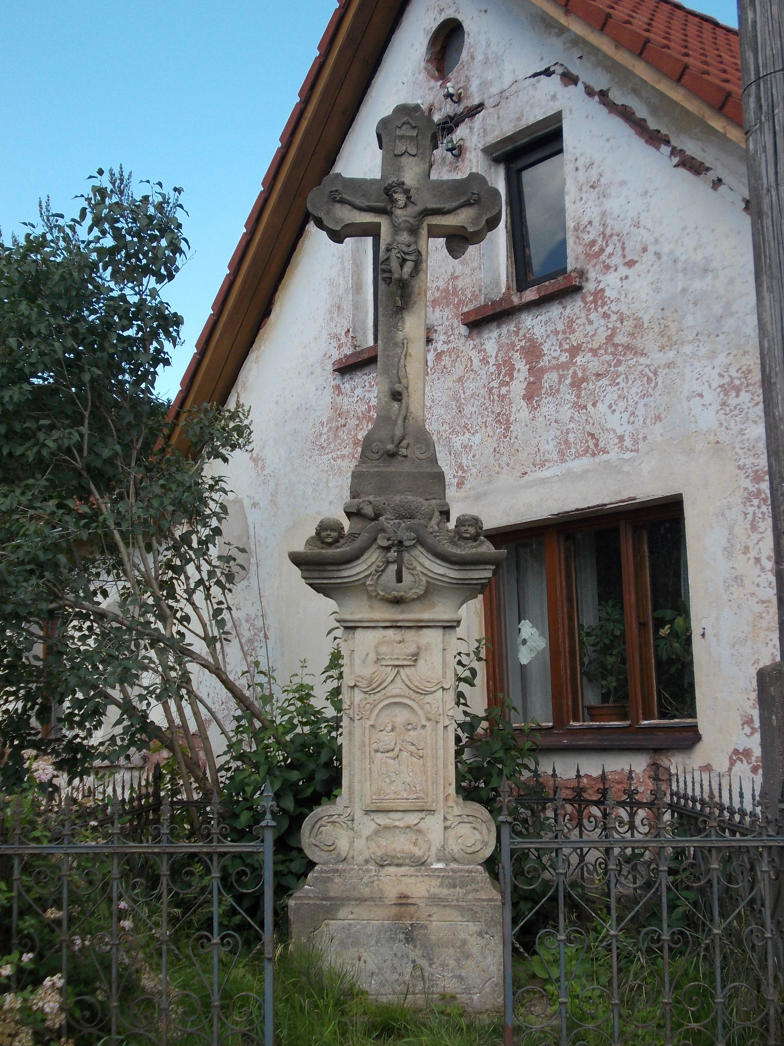 Podlevín - krucifix u č.p.33